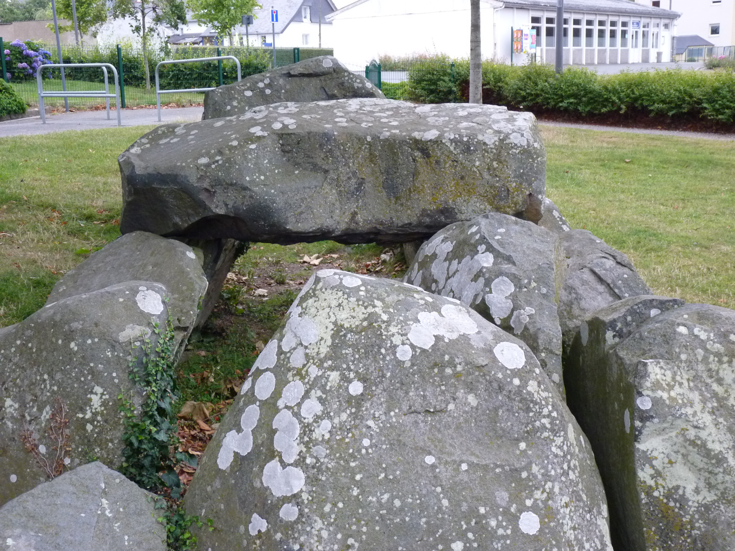 Allée couverte située dans un jardin public en centre-ville.